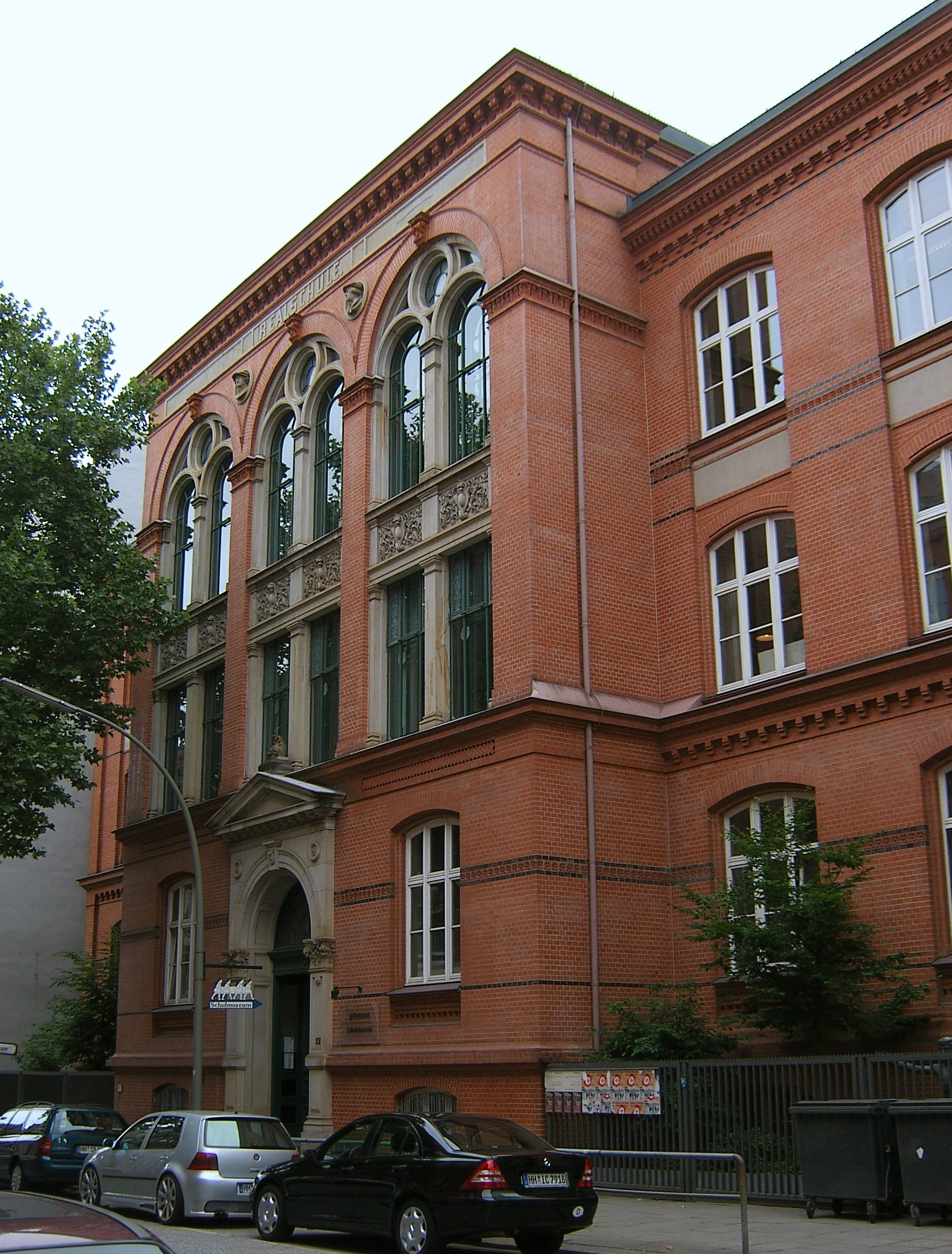 Das Hamburger Schulmuseum ist ein seit 2006 in der ehemaligen Realschule der evangelisch-reformierten Gemeinde von 1886 befindliches Hamburger Museum der Behörde für Schule und Berufsbildung und liegt in der Seilerstraße in St. Pauli.